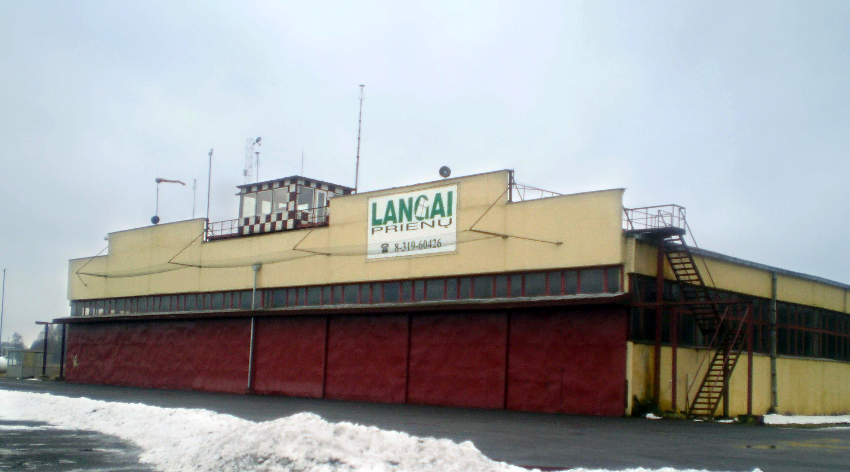 Aerodromo angaras, kur saugoma aviatechnika